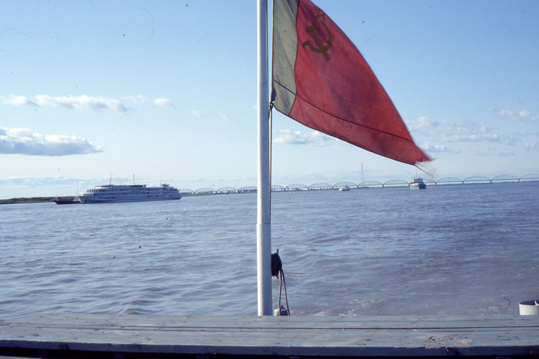 Amour